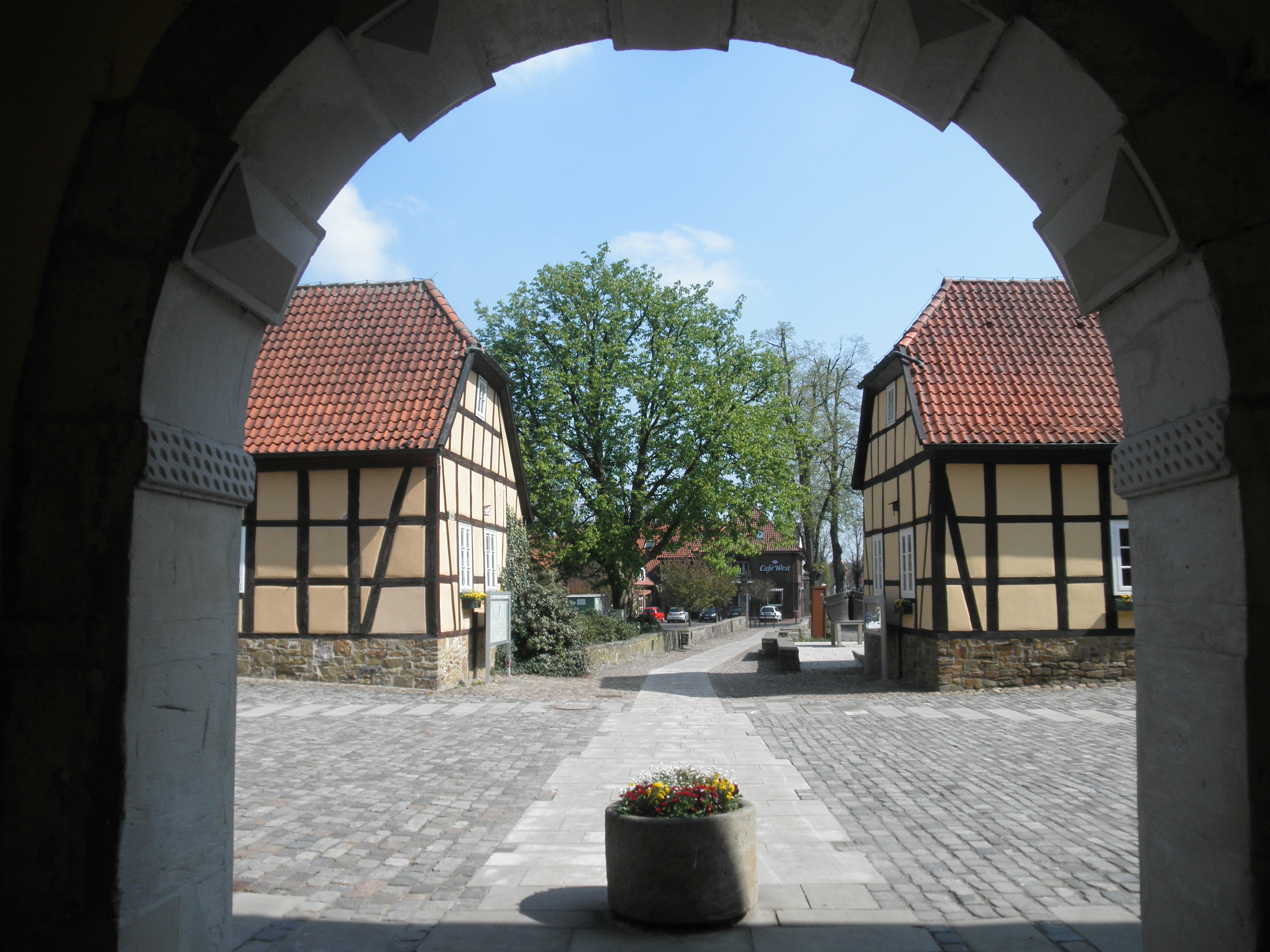 Rigardo el la kastela pordego Fürstenau